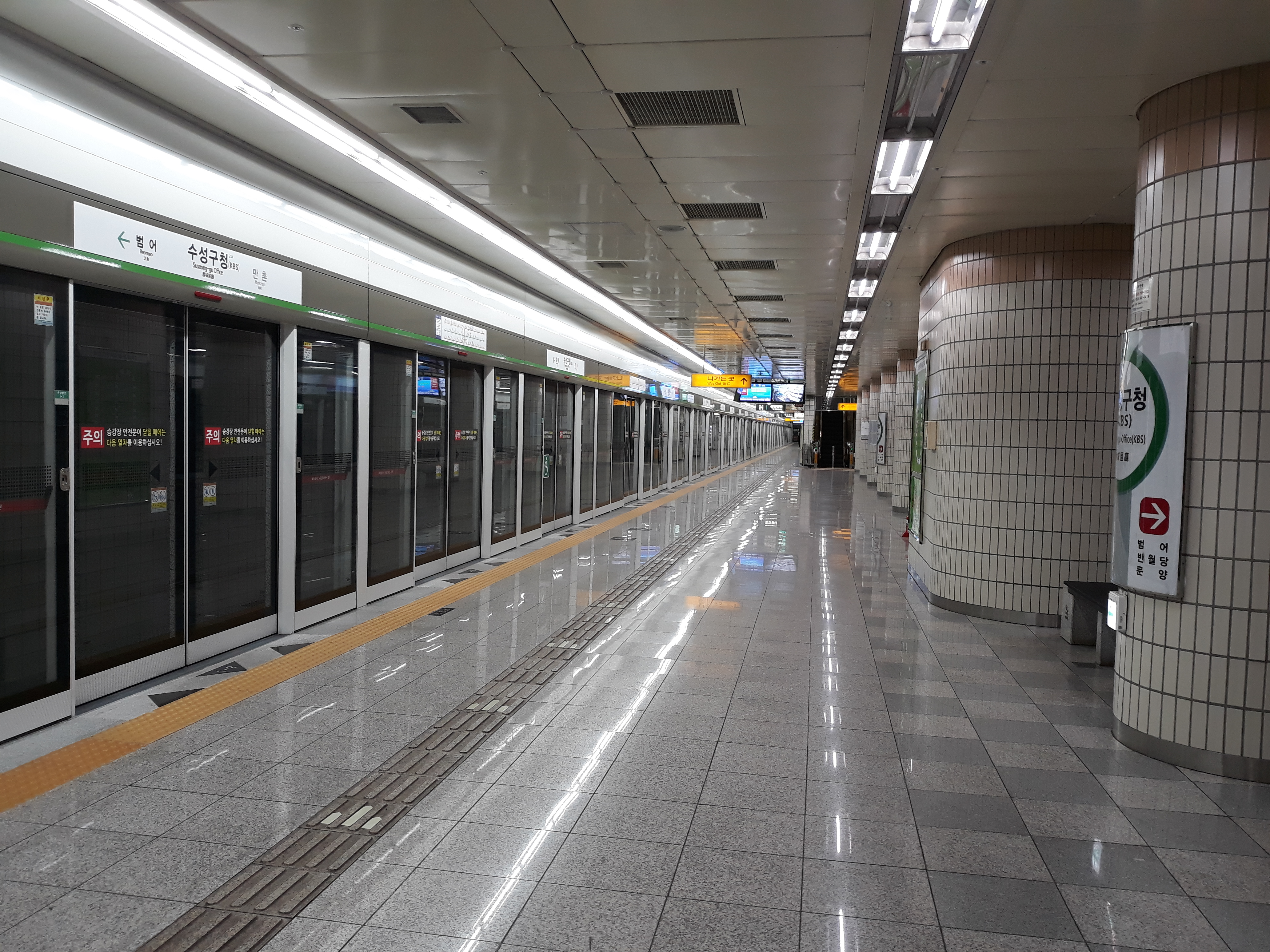 대구 도시철도 2호선 수성구청역 문양 방면 승강장